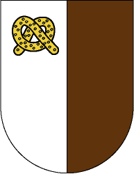 Znak obce Nespeky vytvořený v roce 2006 Mgr. V. Švadlenkou.